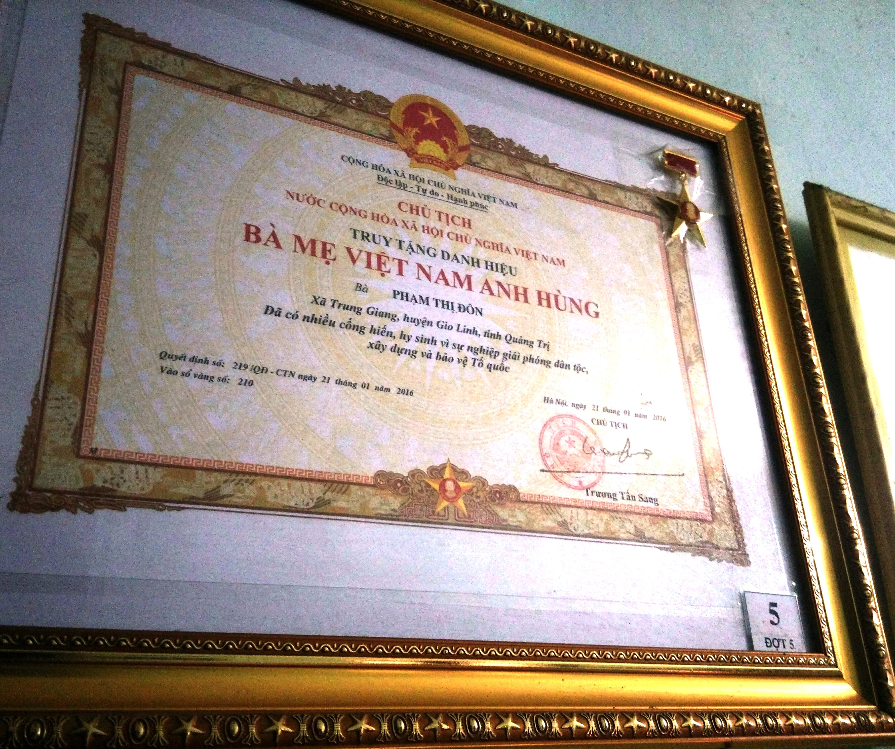 Hình tự chụp bằng máy ảnh cá nhân về Bằng khen của Chủ tịch nước công nhận Danh hiệu Bà mẹ Việt Nam anh hùng